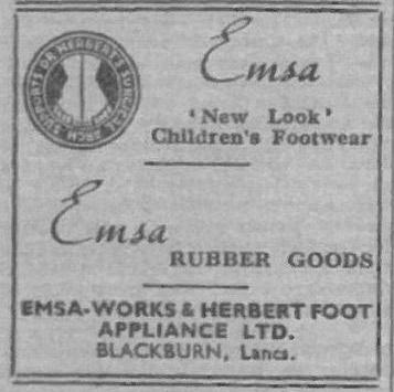 Reklame der EMSA-Works & Herbert Foot Appliance Ltd. in Blackburn.